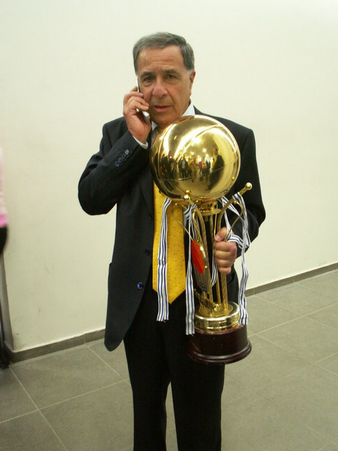 שמעון מזרחי, יו"ר מכבי תל-אביב צולם על-ידי אבי קדמי This picture was taken by Avi Kedmi